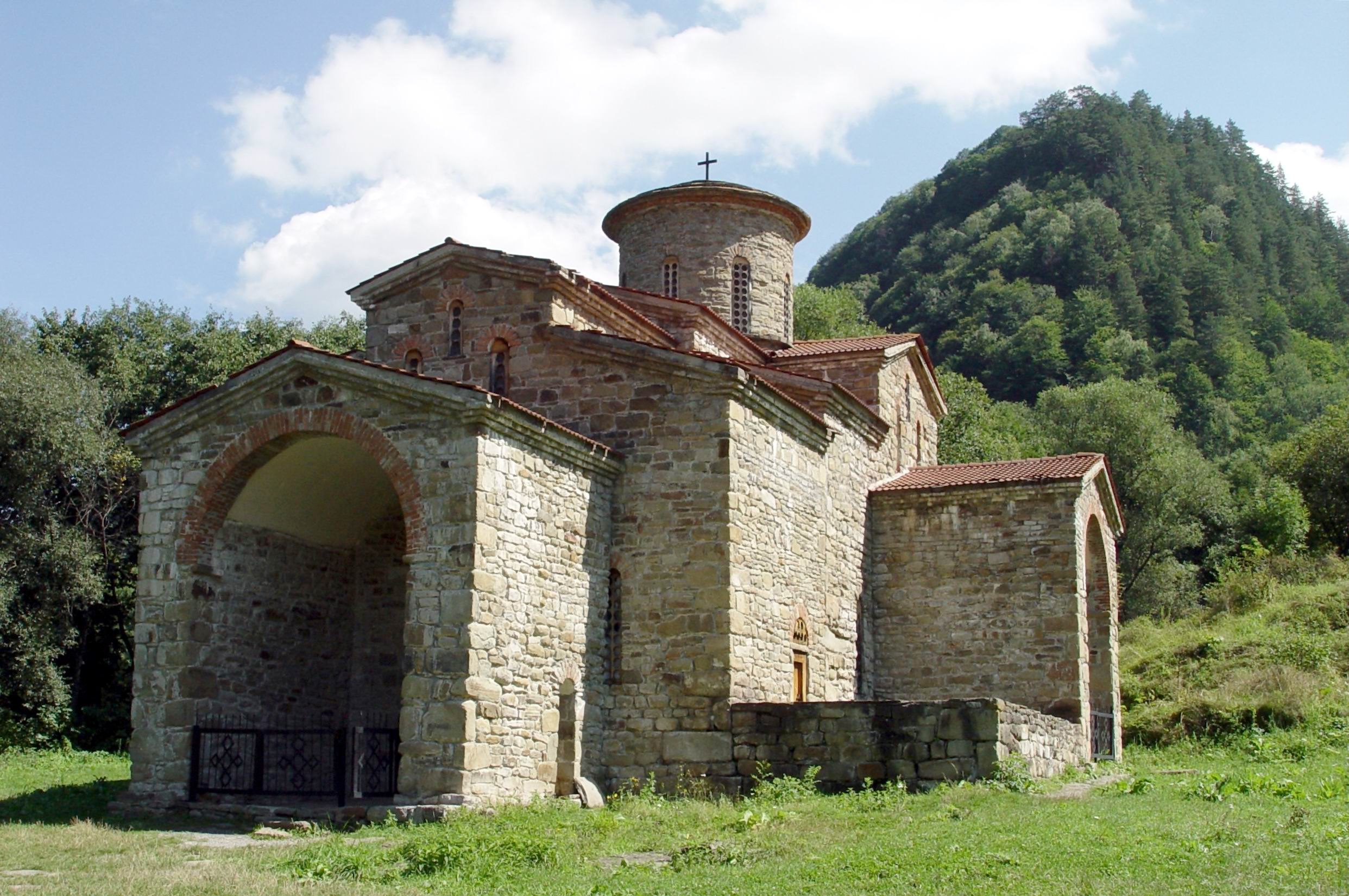 Северный Зеленчукский храм (Х в.) - Георгиевский кафедральный собор Аланской Епархии. Нижне-Архызский историко-архитектурный и археологический комплекс. Карачаево-Черкессия. Музей-заповедник. Снимок сделан со стороны главного входа.